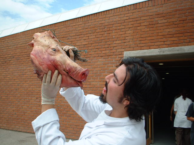 Una de las tradiciones típicas del mechoneo es besar la cabeza de un cerdo.